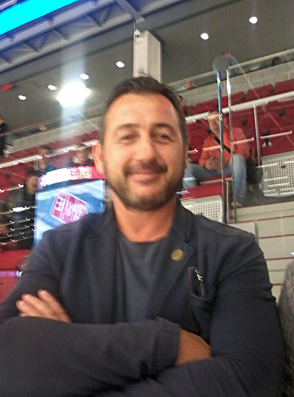 23.8.2017 ve Werk Areně jako divák na přátelském utkání Česko - Slovensko